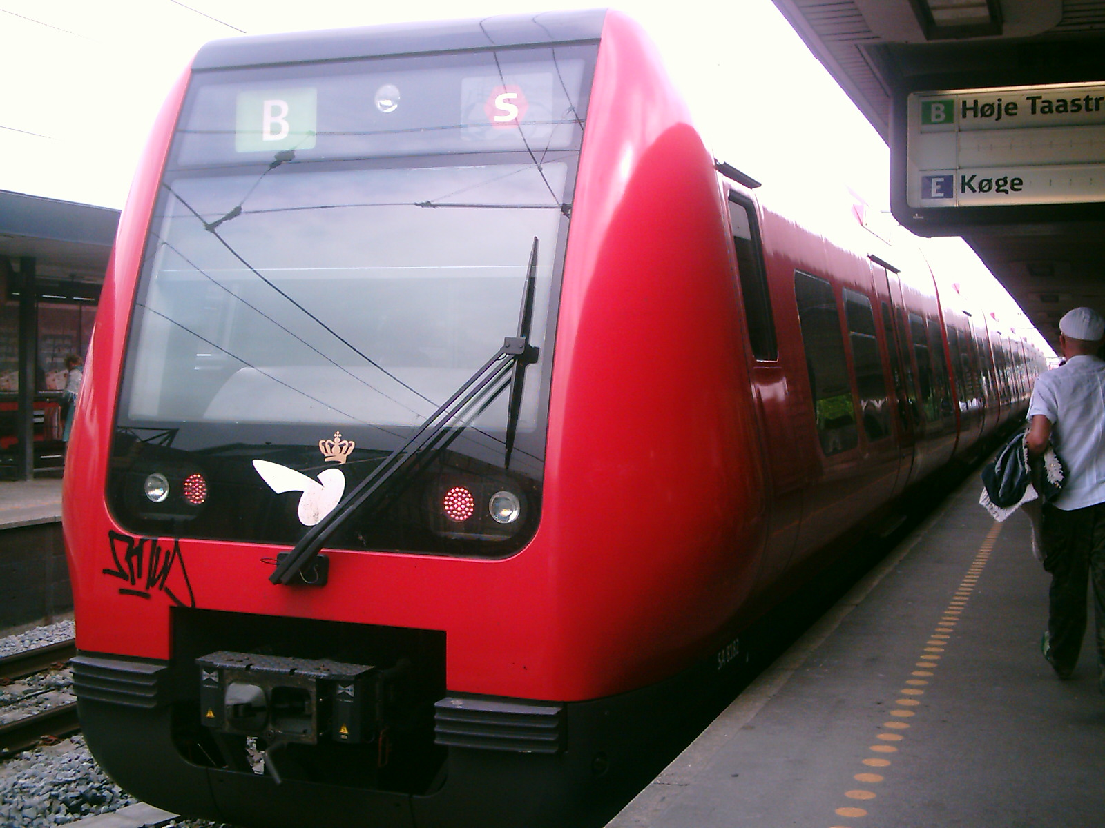 Et S-tog på linje B